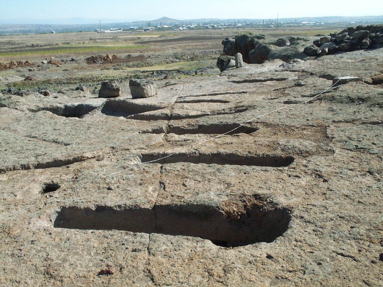 ԲՆԱԿԱՏԵՂԻ, մթա 4 հզմ. զարգացած միջնադար 4/1